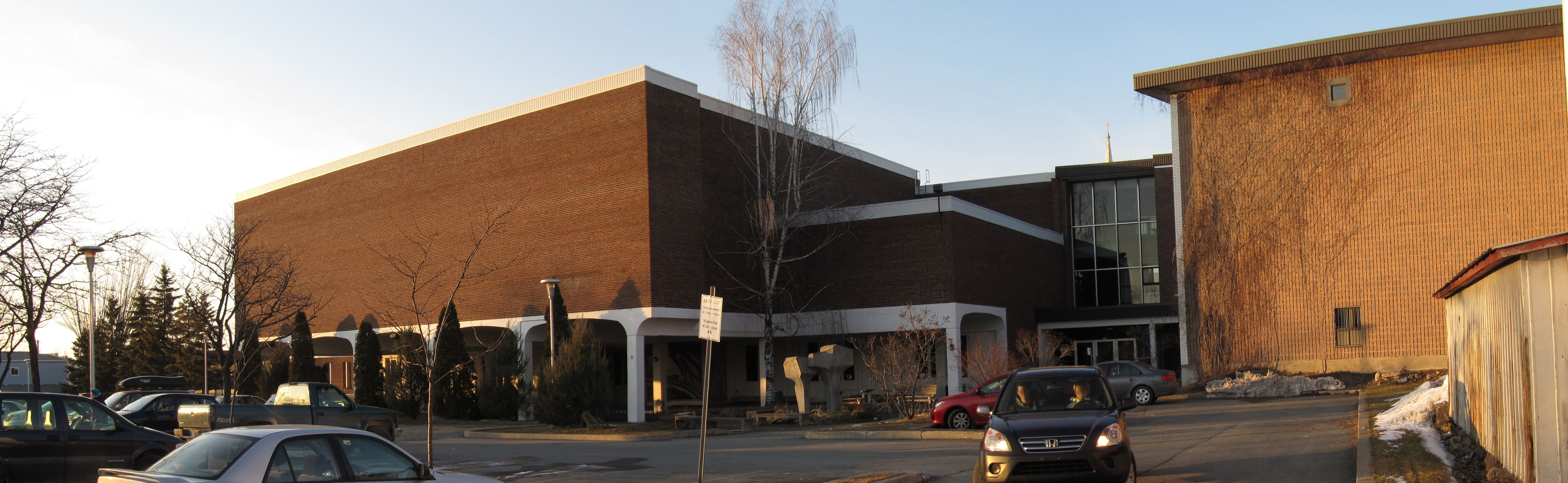 Cégep de Granby Haute-Yamaska - Entrée rue Saint-Antoine